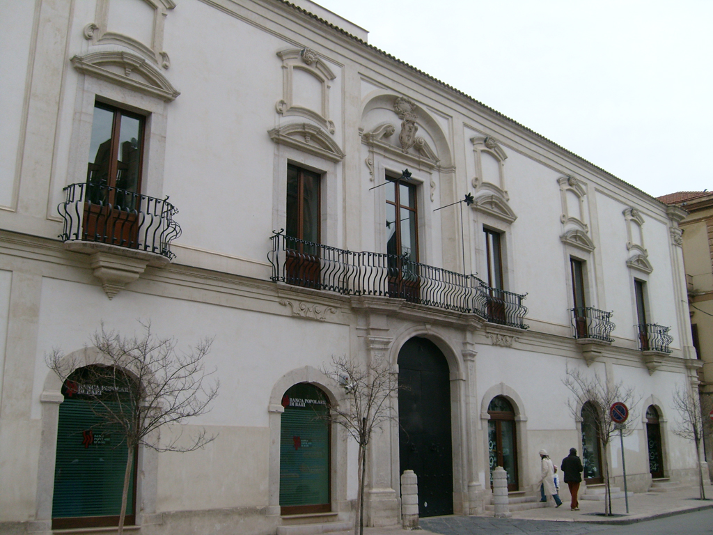 Facciata di Palazzo Coccia-Cirillo di Cerignola (FG).